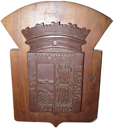 Escudo de Armas de Melena del Sur